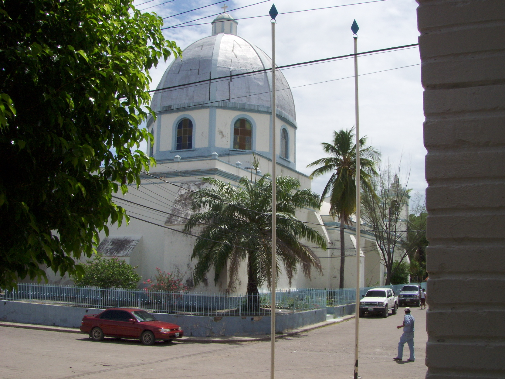 La cùpula de la catedral de Nacaome, Departamento de Valle, Honduras